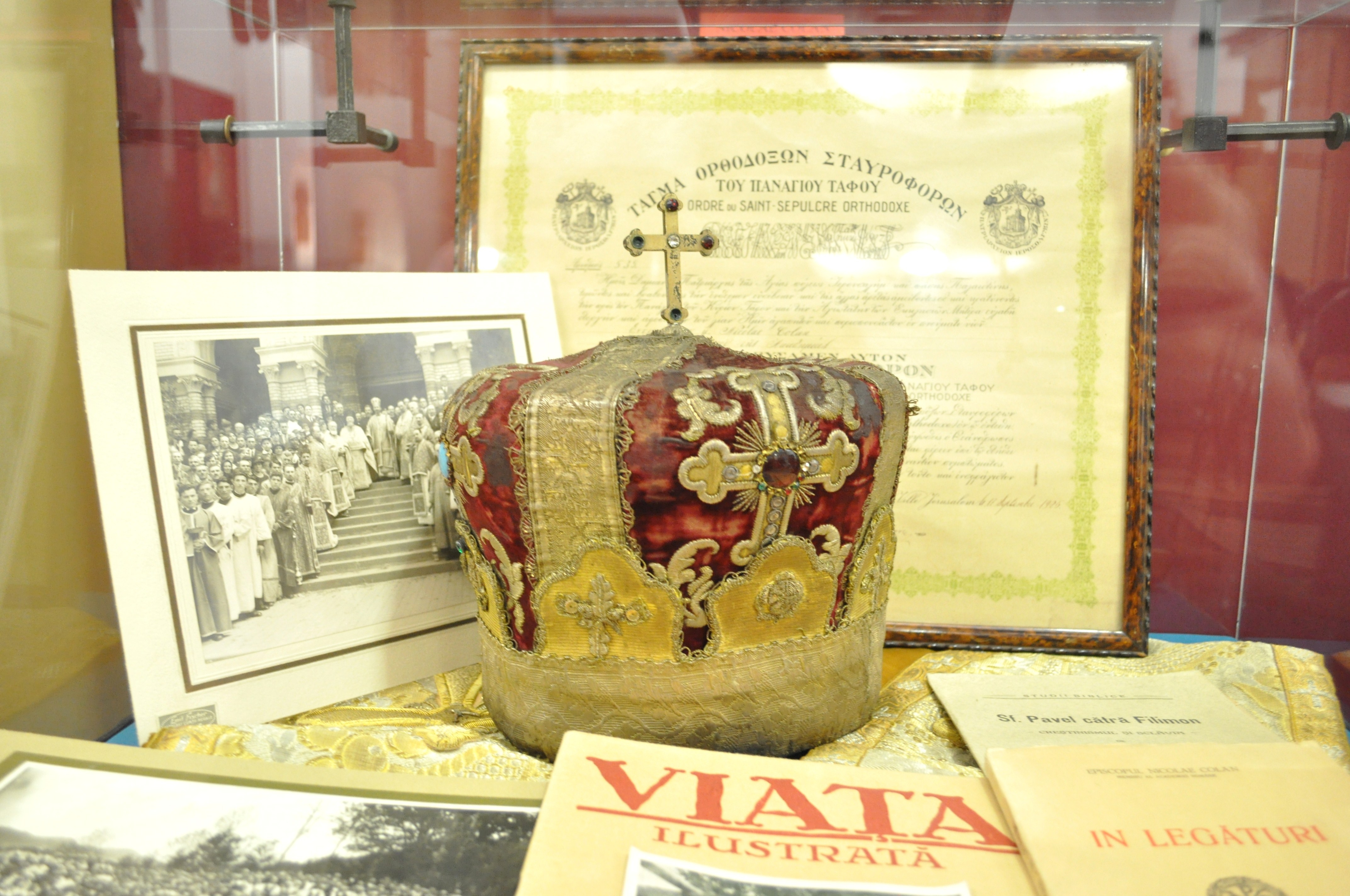 Mitra de arhiereu a episcopului Nicolae Colan